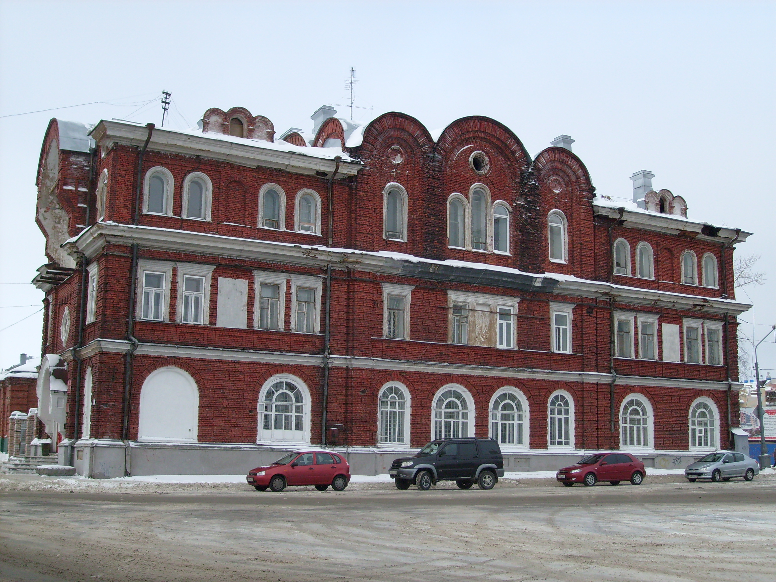 Архангельск, Набережная Северной Двины, 47. Подворье Сурского монастыря, 1905—1907. Архитектор Ермолин. Ныне - военкомат и военная прокуратура.